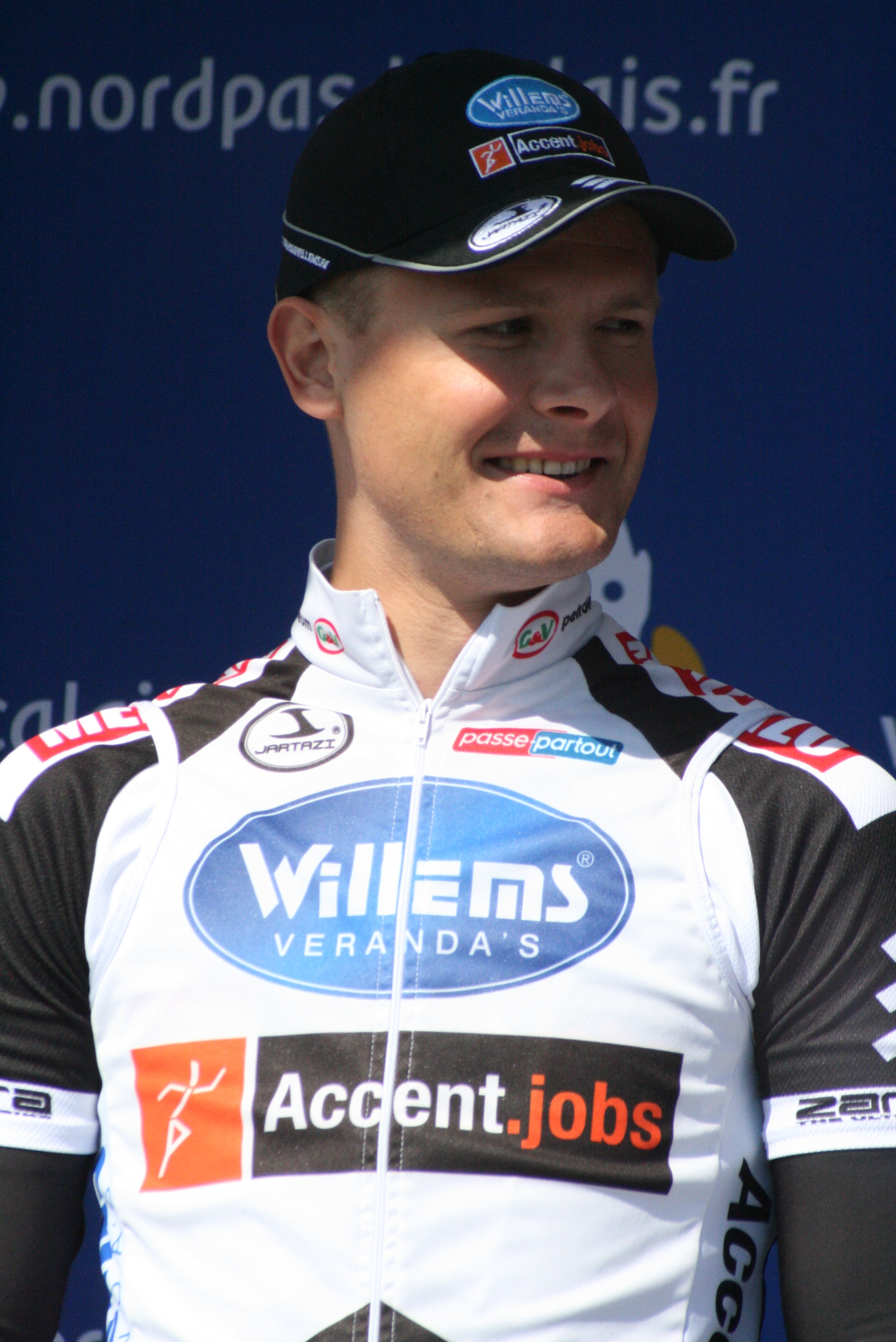 Présentation des coureurs au départ de la première étape Steven Caethoven